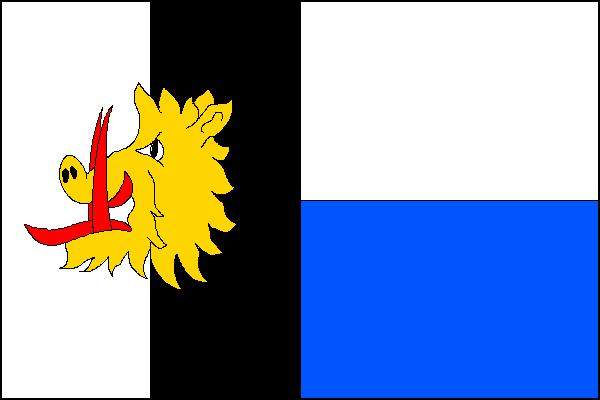 Vlajka obce Horní Habartice